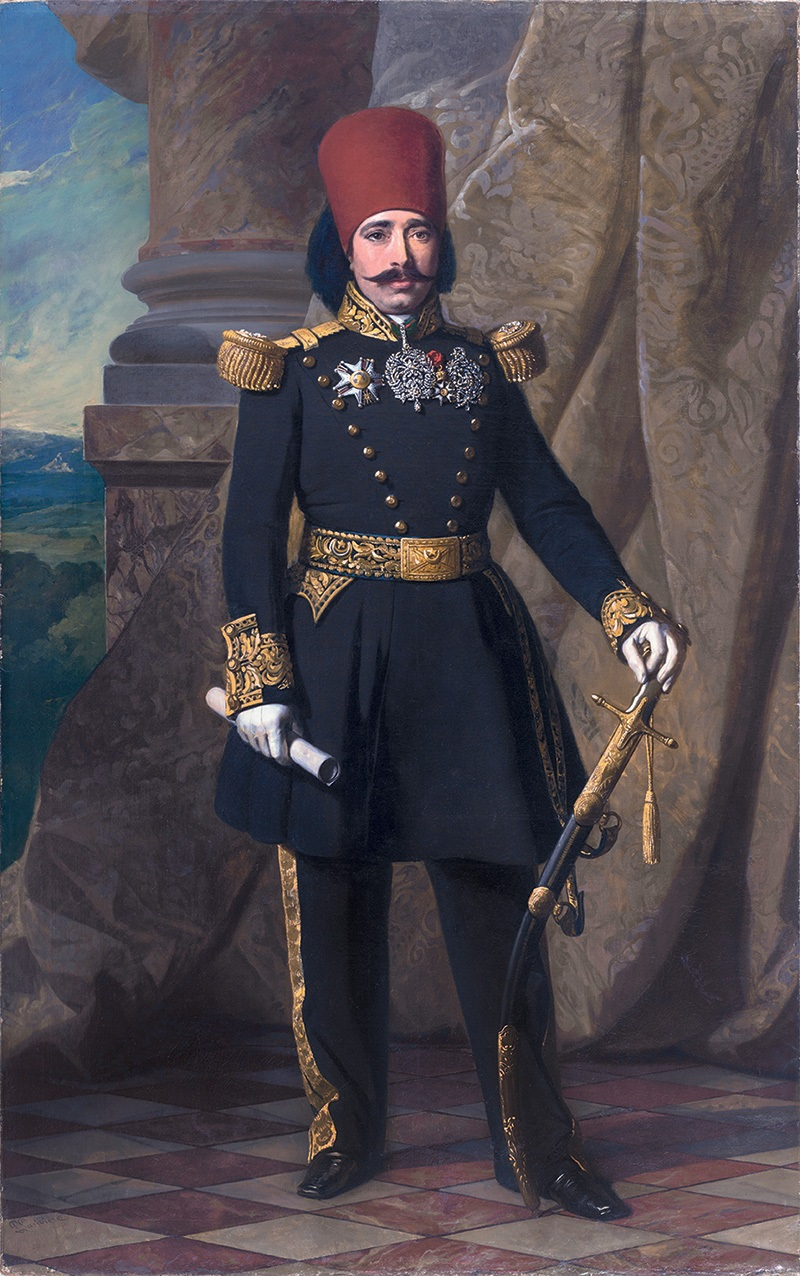 Mustapha Khaznadar Tableau représentant Mustapha Khaznadar, réalisé lors de sa visite en France en novembre-décembre 1846 Huile sur toile, 140 x 221,5 cm Tunis, Institut national du patrimoine, collection Qsar es-Saïd, inv. 46-07-28-11